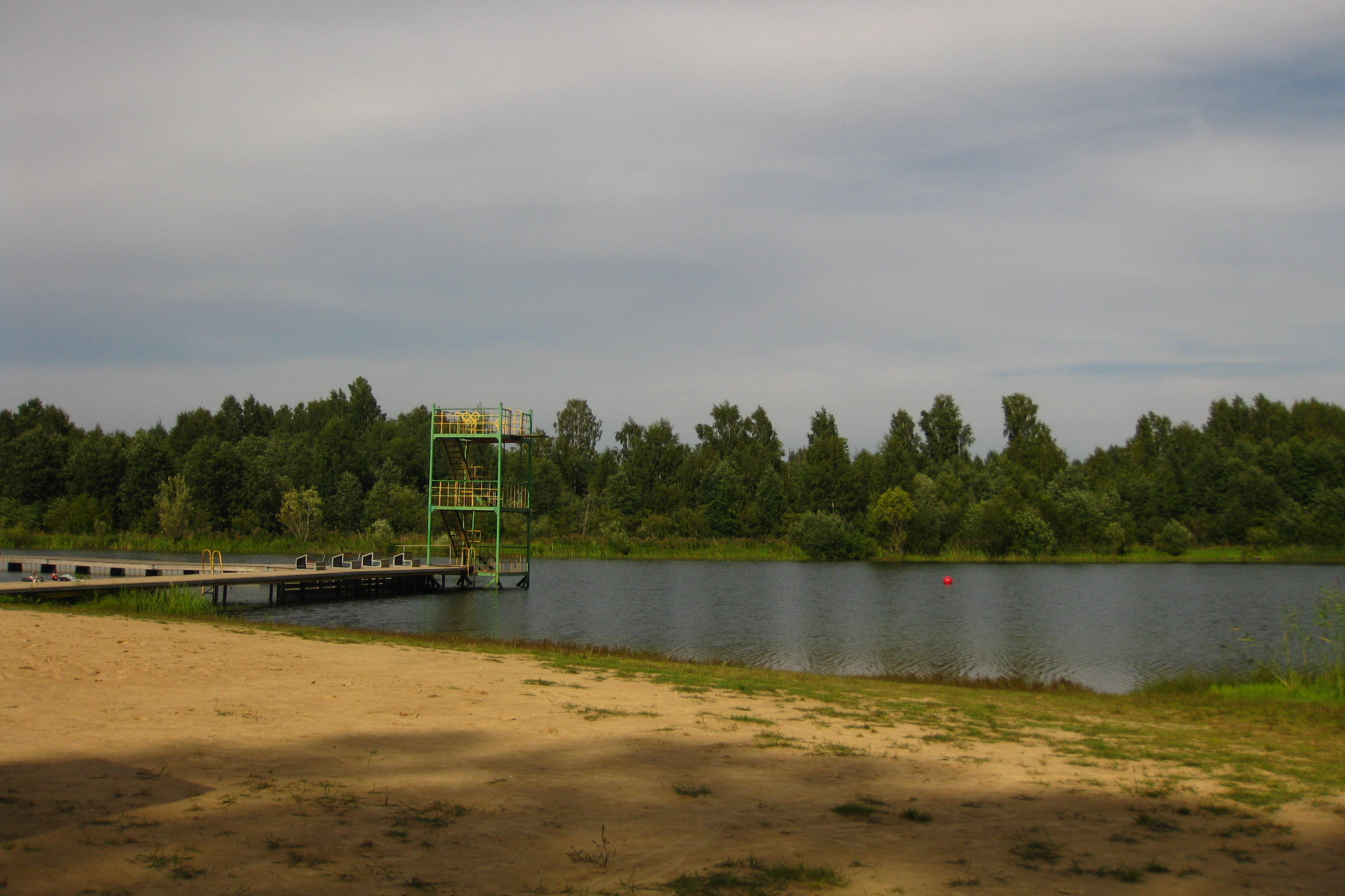 Türi tehisjärve läänekaldal